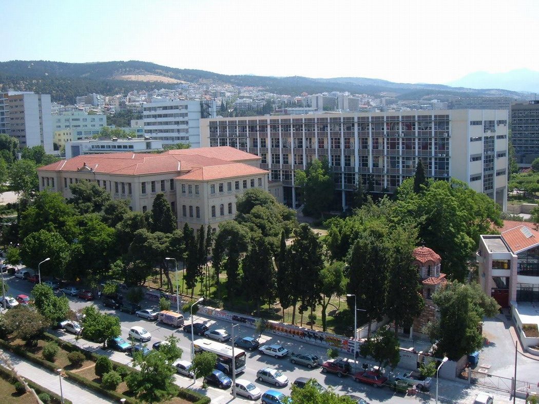 Universidad aristotélica de Tesalónica